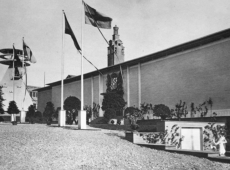 Exposición Internacional de Barcelona (1929). Pabellón de Suecia. Arquitecto Peder Clason.